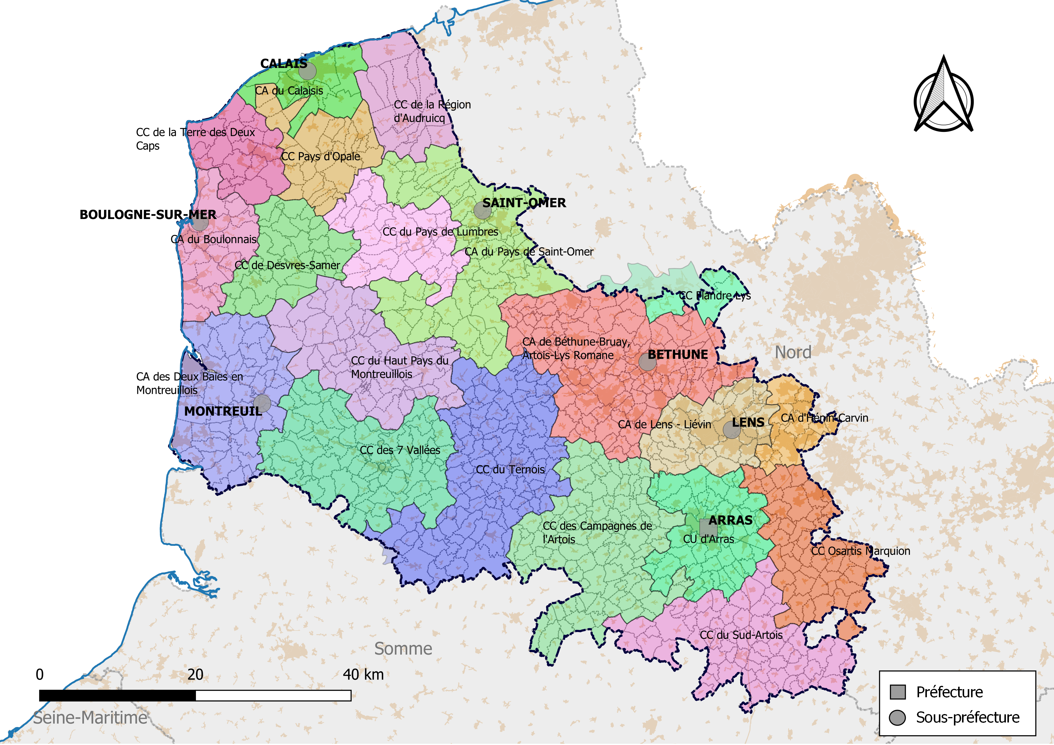 Carte des intercommunalités du département du Pas-de-Calais, France. Composition au 1er janvier 2019.